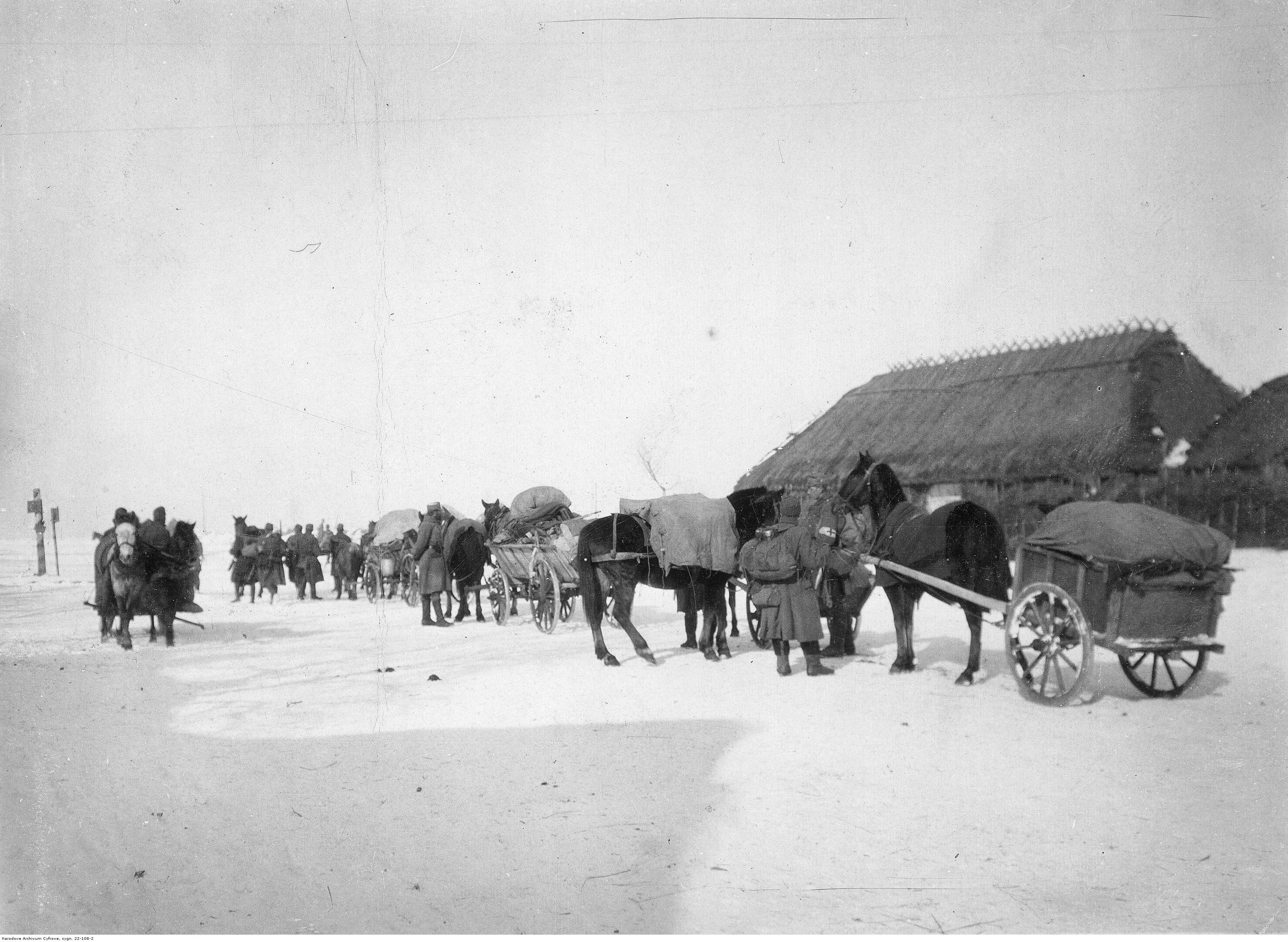 Tabory podczas marszu.